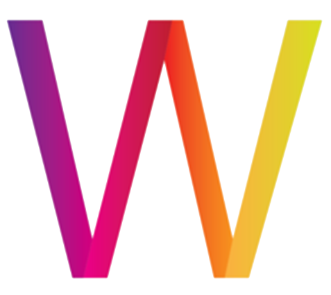 W mean Wawkak. This is logo of